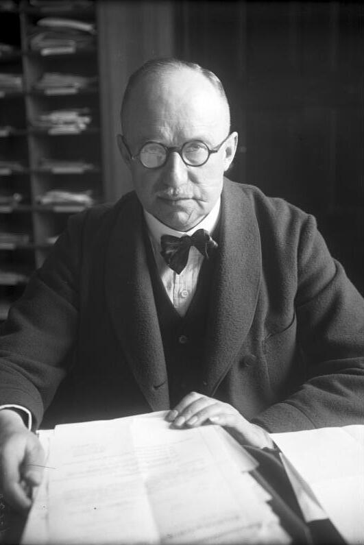 Interessantes aus der Preussischen Landesanstalt für Wasser-, Boden- und Lufthygiene in Berlin-Dahlem! Die Forschungen und Arbeiten der Preussischen Landesanstalt für Wasser-, Boden - und Lufthygiene sind für die Volkshygiene äusserst wertvoll. An Hand hygienischer Versuche an Pflanzen und Tieren wird die Übertragung von Bazillen wissenschaftlich festgestellt und deren Gegenmassnahme erprobt. Geh. Med.-Rat Prof. Dr. M. Beninde der Präsident und verdienstvolle Leiter der Preussischen Landesanstalt für Wasser-, Boden- und Lufthygiene in Berlin-Dahlem